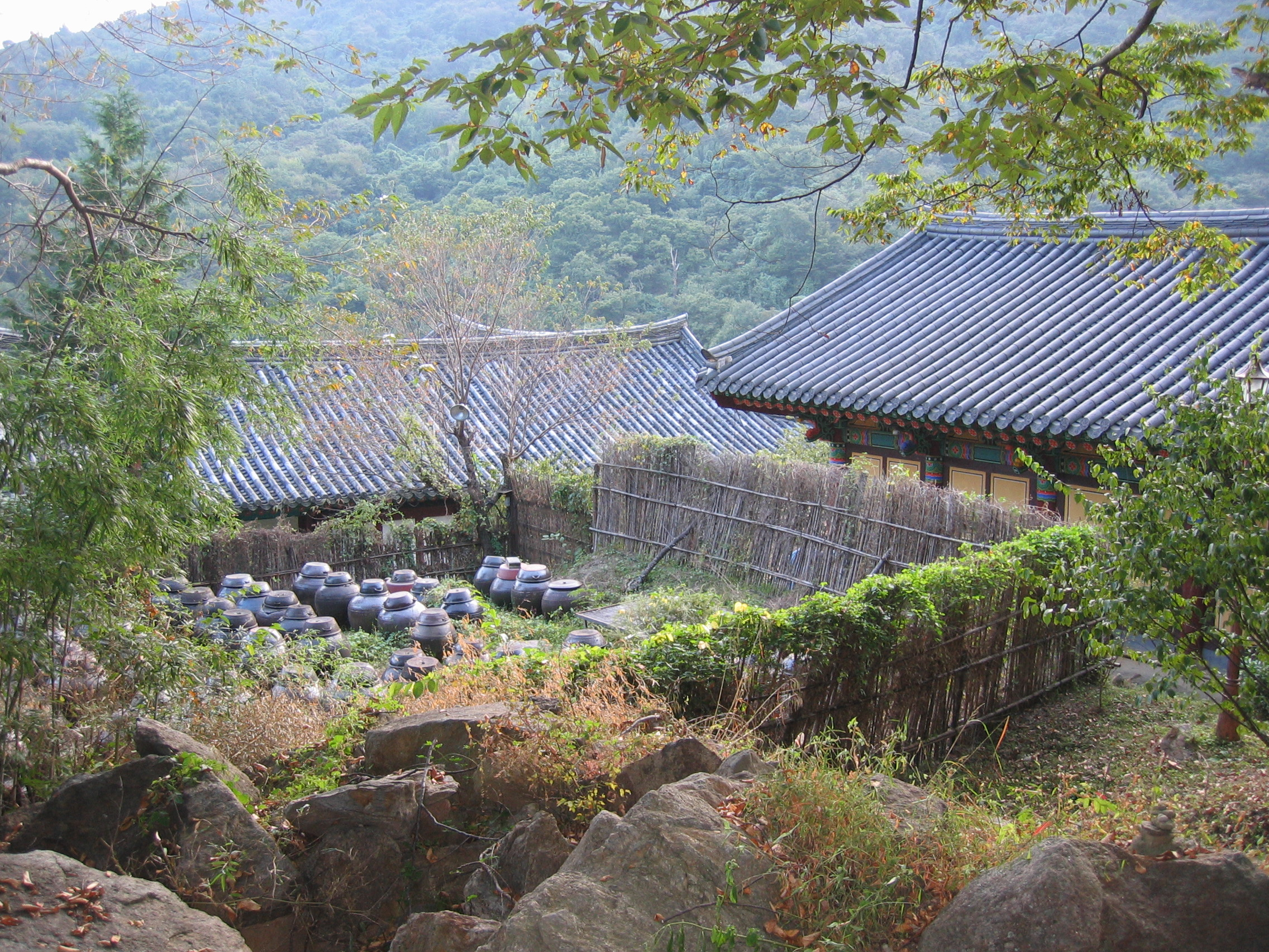 2006년 대한민국 지리산에 위치한 연곡사 Yeongoksa, one of the Buddhist temples in Jirisan (Mt.Jiri), South Korea, 2006